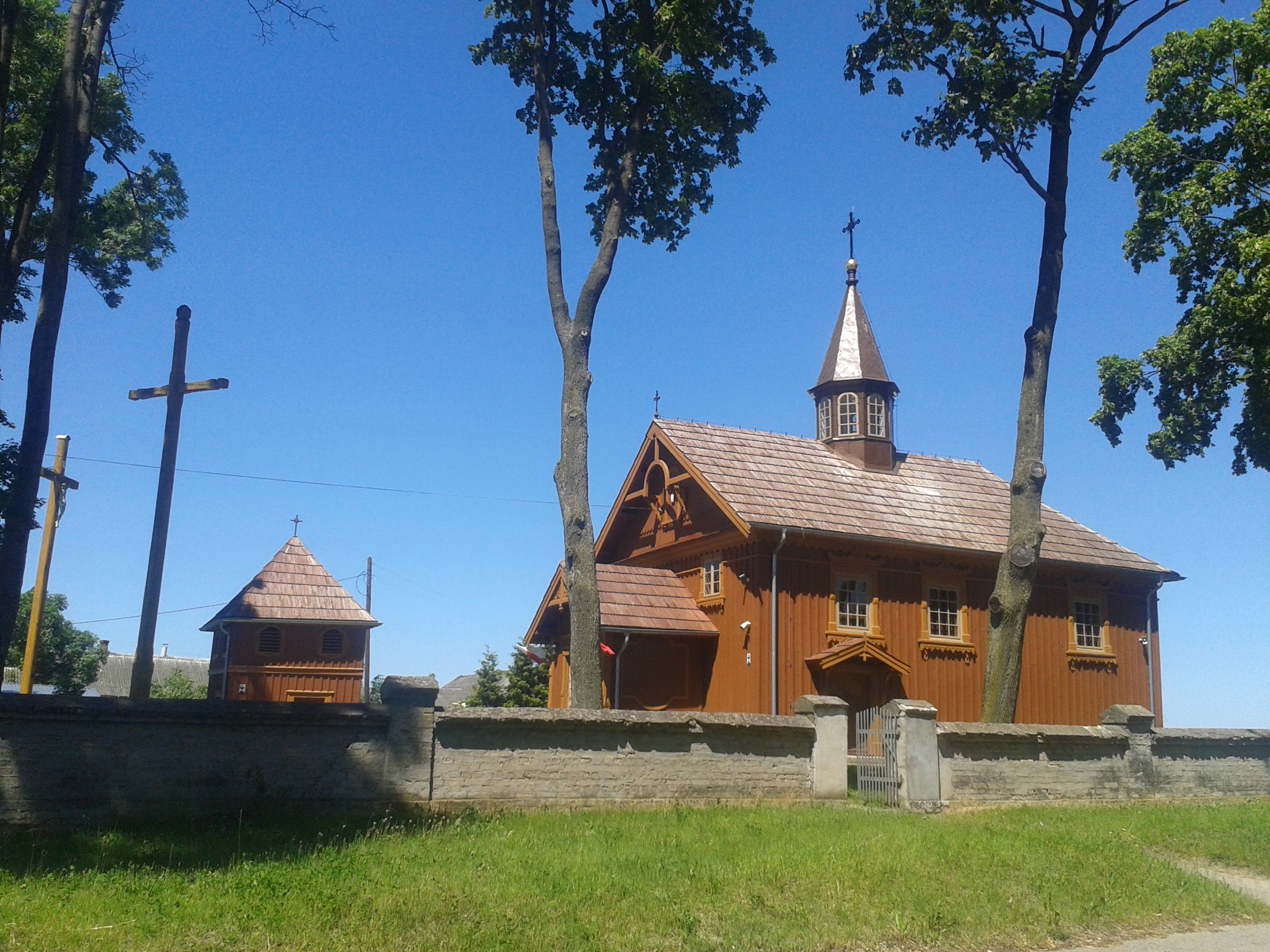 Widok ogólny zespołu cerkiewnego w Rogowie